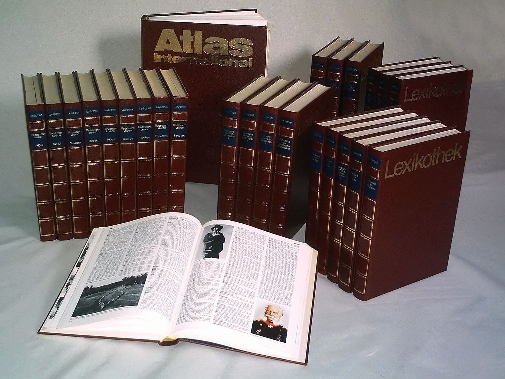 Bertelsmann Lexikothek in 26 Bänden, 1983. Links und vorne aufgeschlagen das Bertelsmann Lexikon in 10 Bänden, dahinter der Atlas International; in der Mitte Panorama der Weltgeschichte I-III und Panorama der deutschen Geschichte, dahinter Länder Völker Kontinente I-III; rechts Spektrum der Literatur, Spektrum der Kunst, Spektrum der Naturwissenschaften, Die Welt der Tiere und Das Reich der Pflanzen, dahinter Wege zu Wissen und Bildung, Technik in unserer Welt und Mensch und Gesundheit.